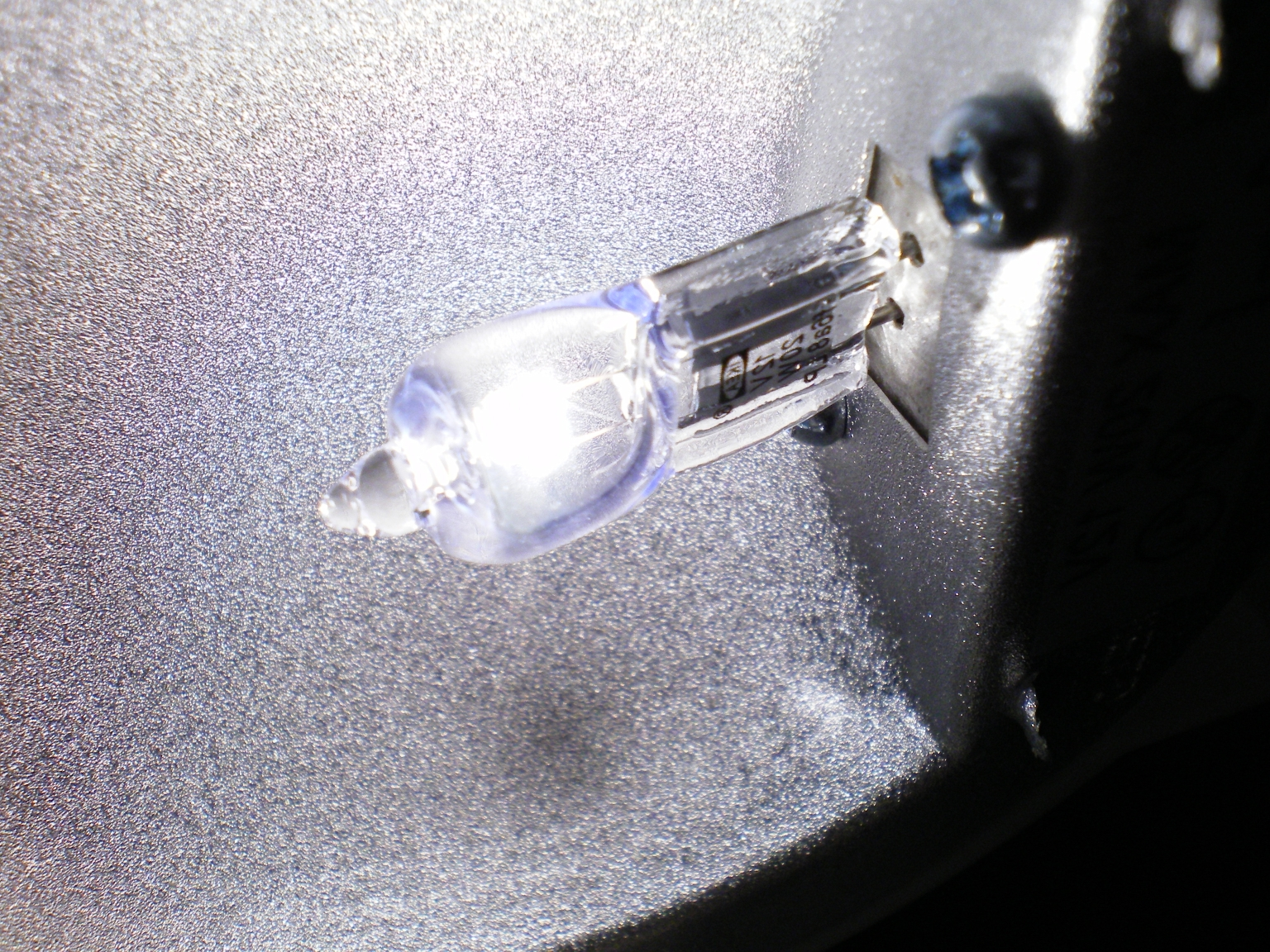 Halogen lamp under operation